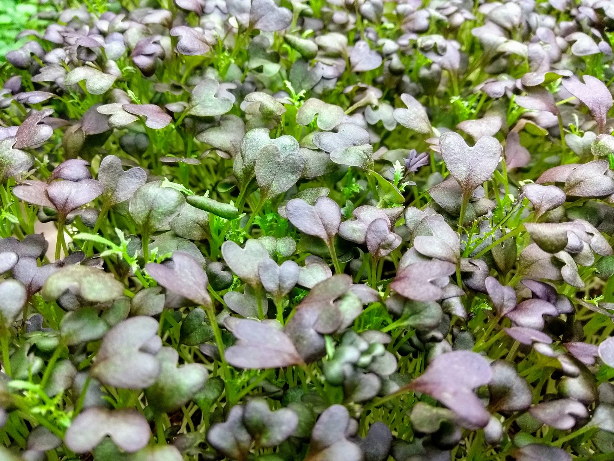 Mizuna microgreen